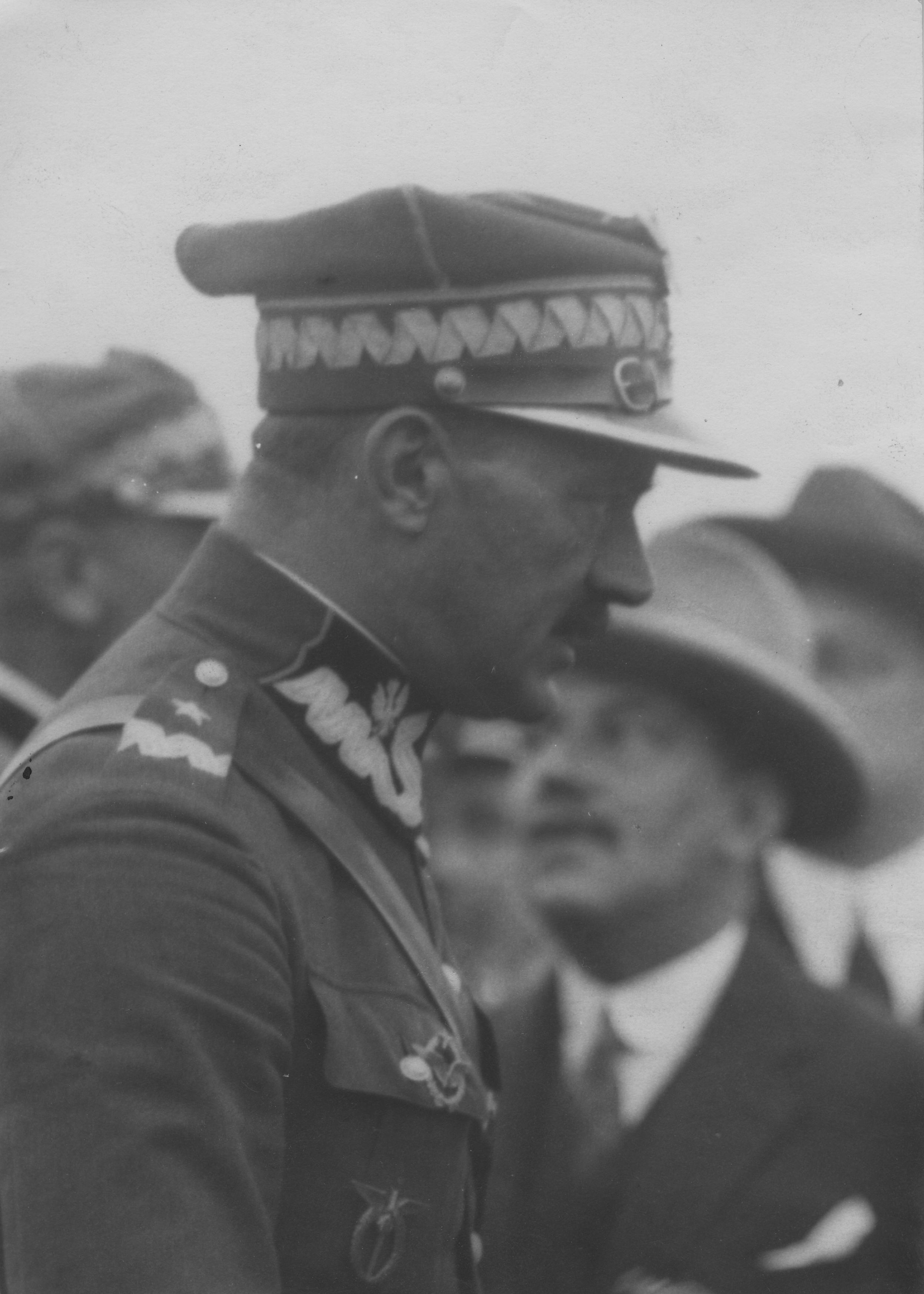 Powitanie polskich lotników wojskowych po powrocie z wizyty w Hiszpanii do Warszawy. Widoczny generał Włodzimierz Zagórski.